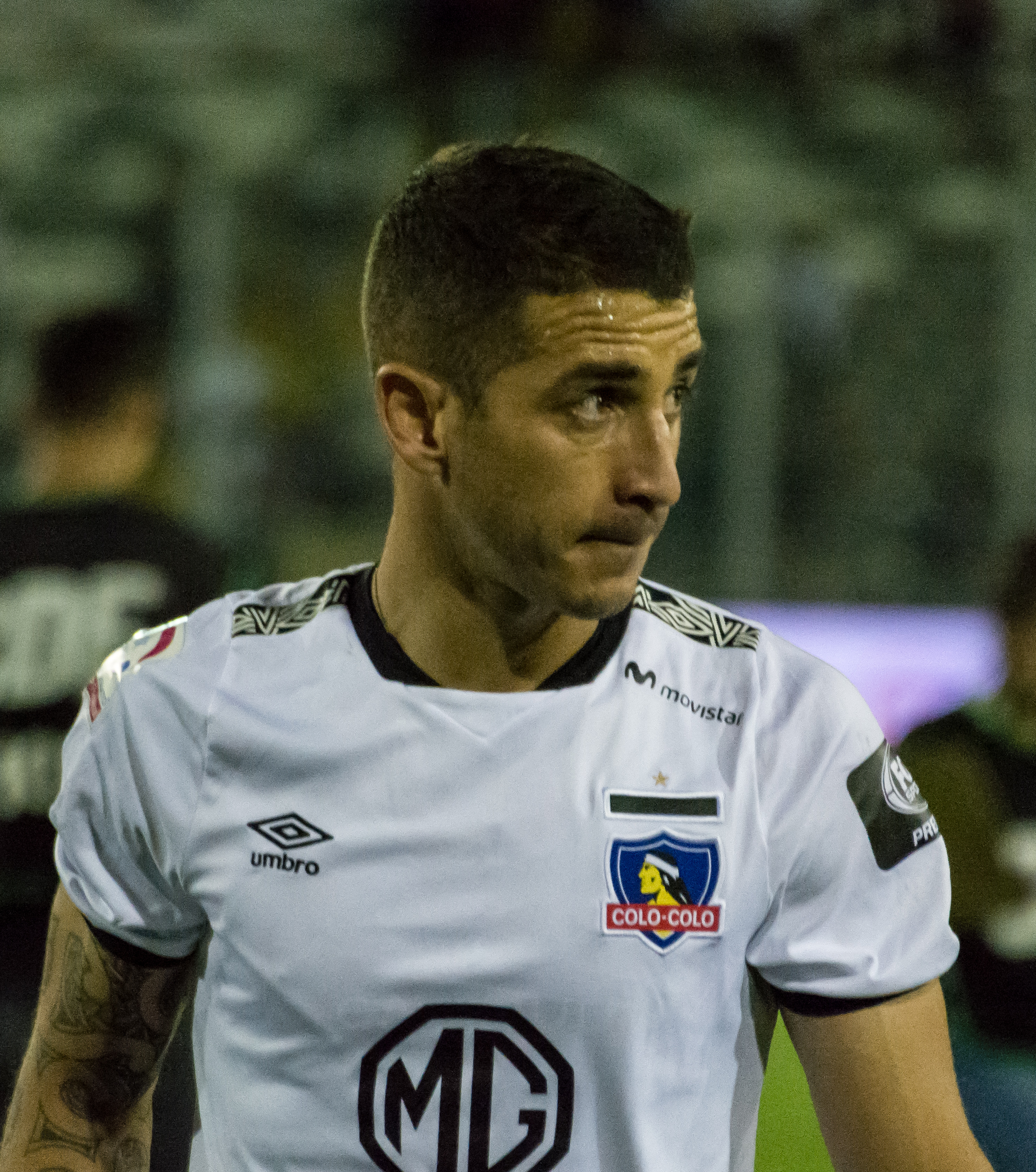 Colo-Colo v Palestino, Estadio Monumental, Macul, Santiago, Región Metropolitana, Chile